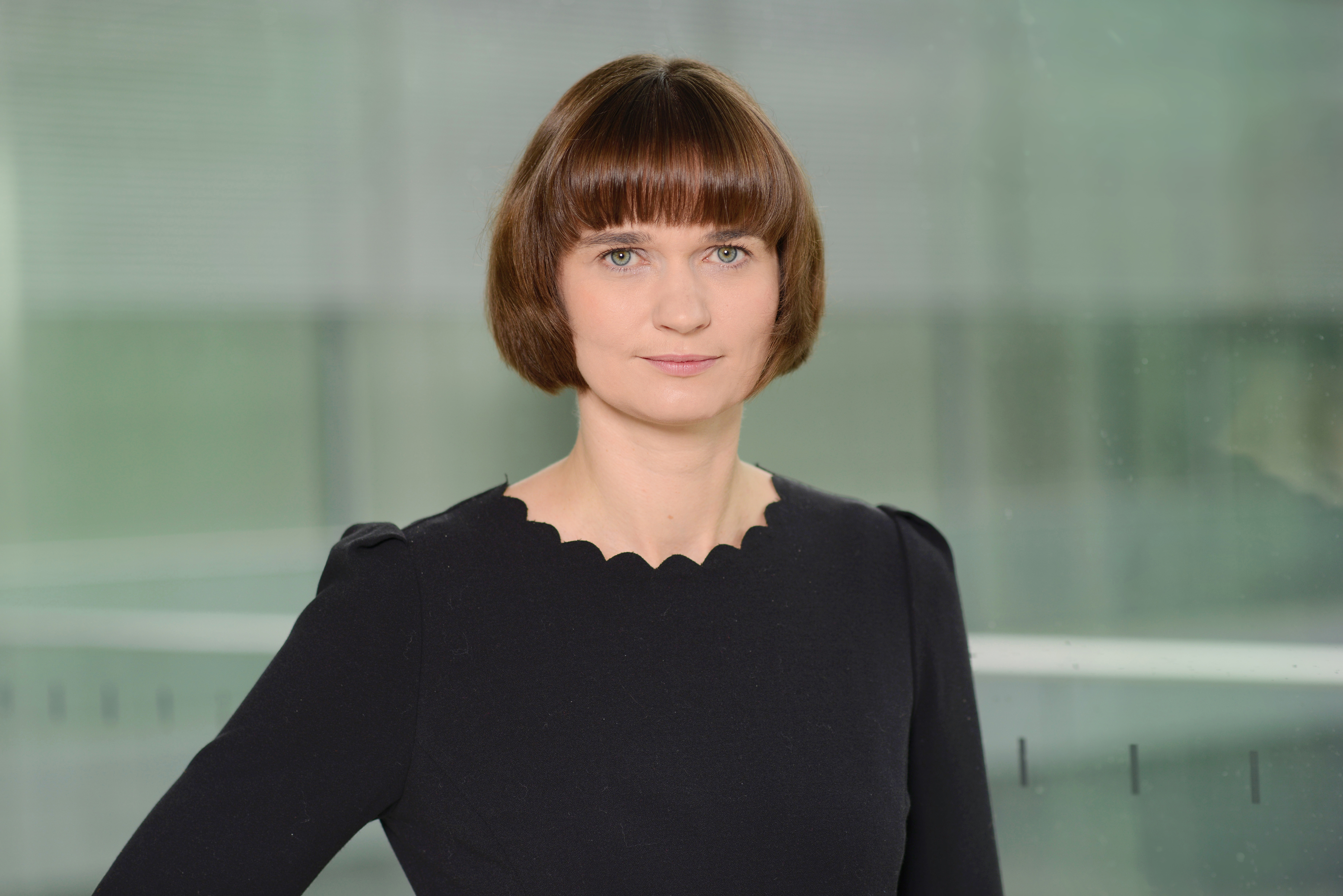 Claudia Müller MdB, Bündnis 90/Die Grünen Bundestagsfraktion